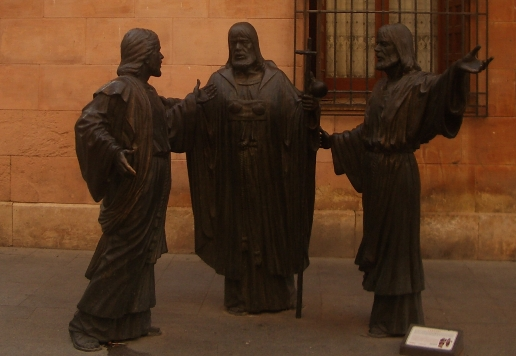 el Ternari, Misteri d'Elx, Elche